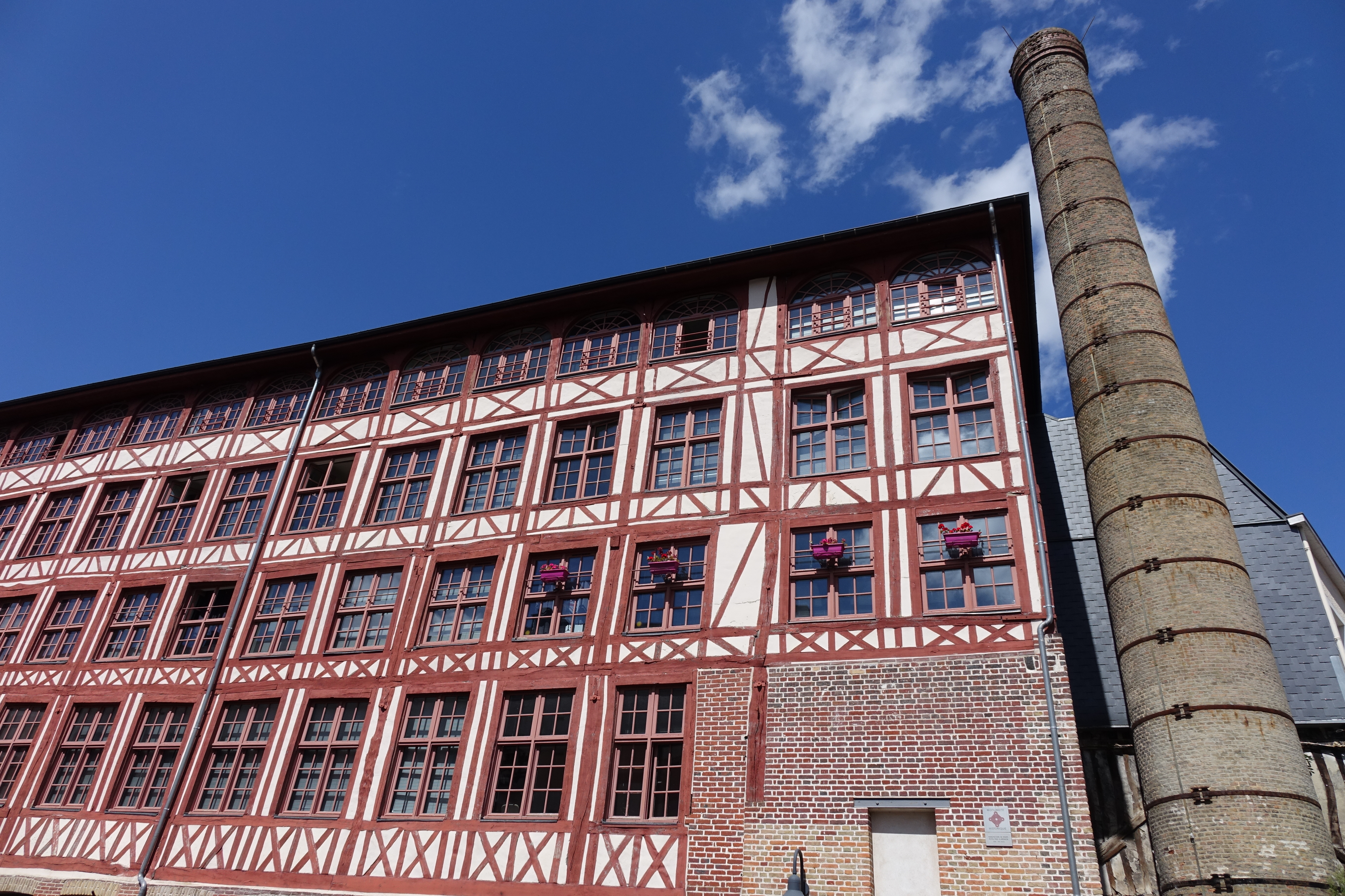 La filature Clarenson à Elbeuf, Seine-Maritime, France .